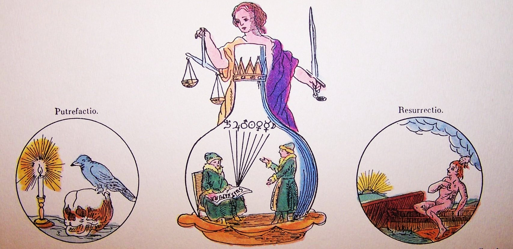 Détail de l'une des planches alchimiques publiées à Altona en 1785